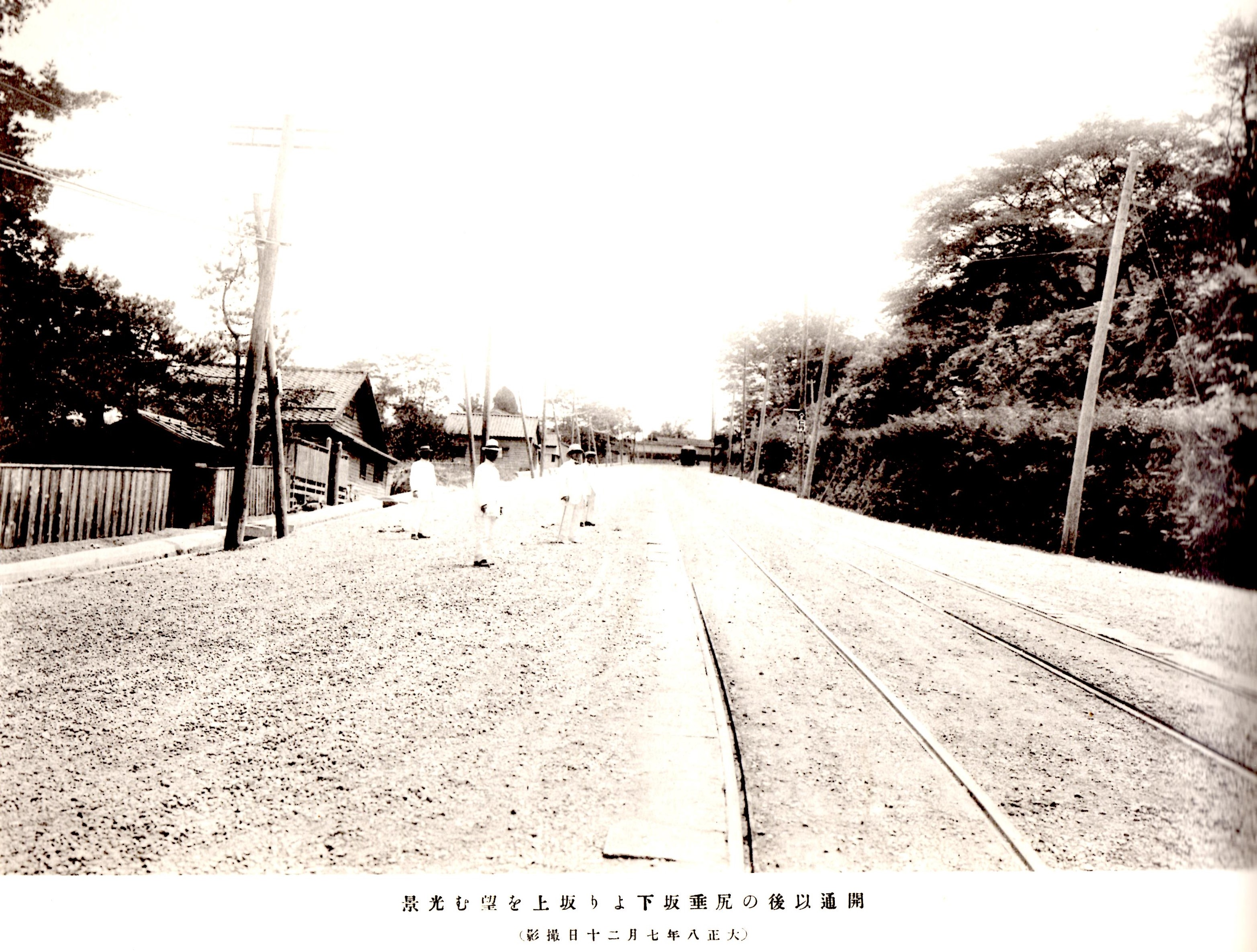 原題は「開通以後の尻垂坂下より坂上を望む光景」